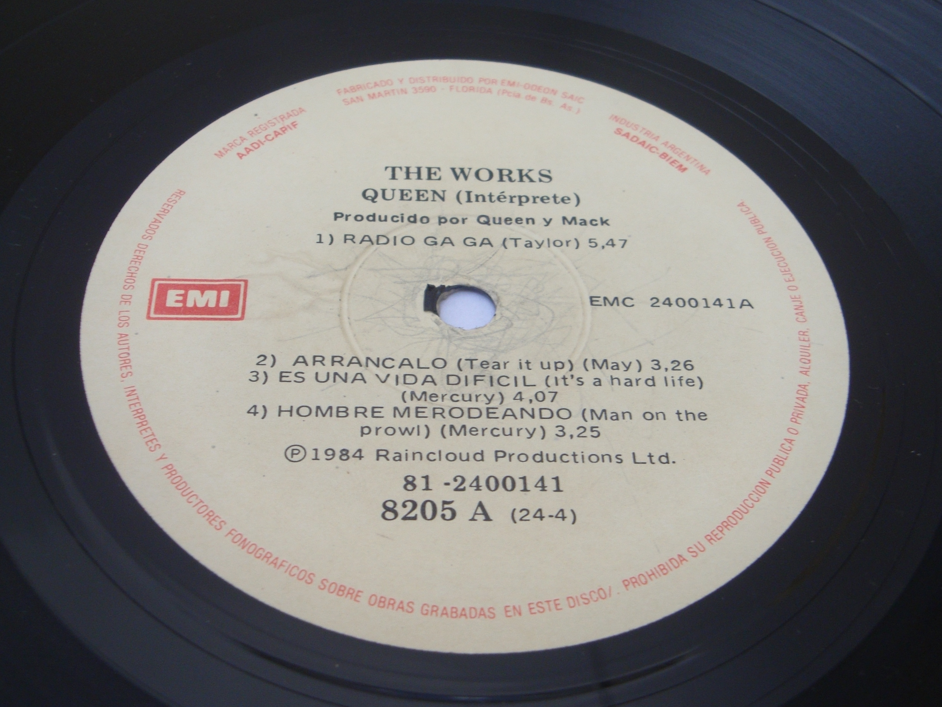 Fotografía tomada por mi del álbum "The Works" de Queen. Editado en formato vinilo en 1984 por EMI.